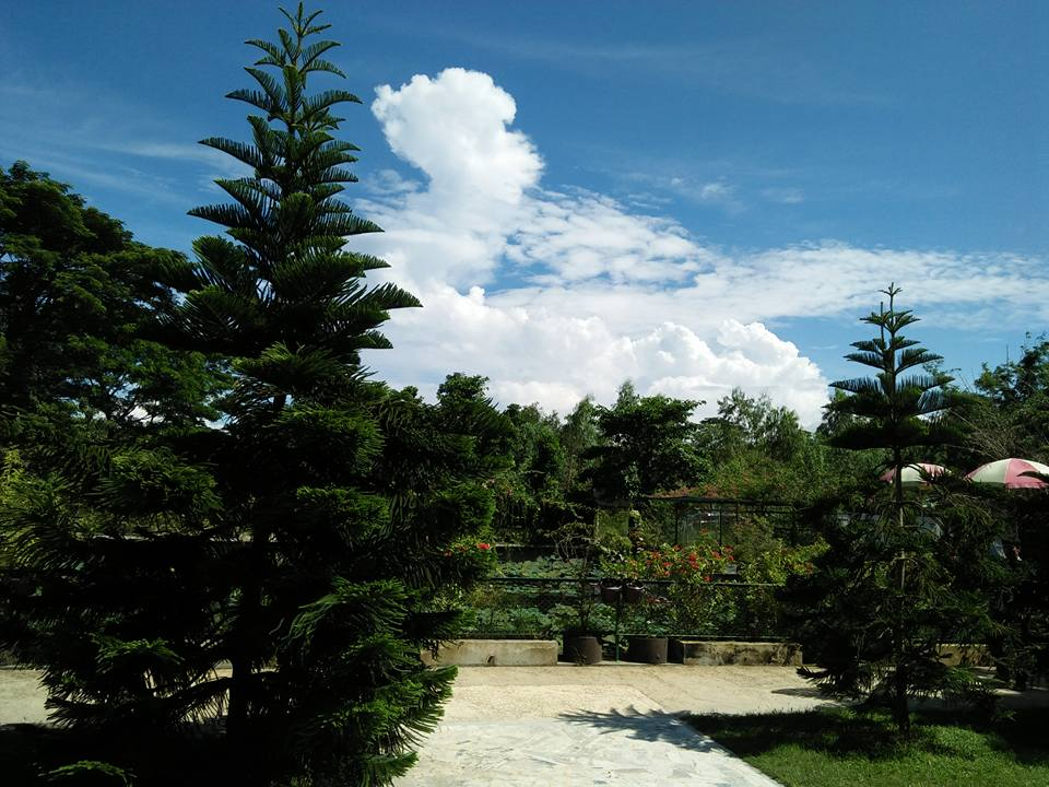 বলধা গার্ডেন